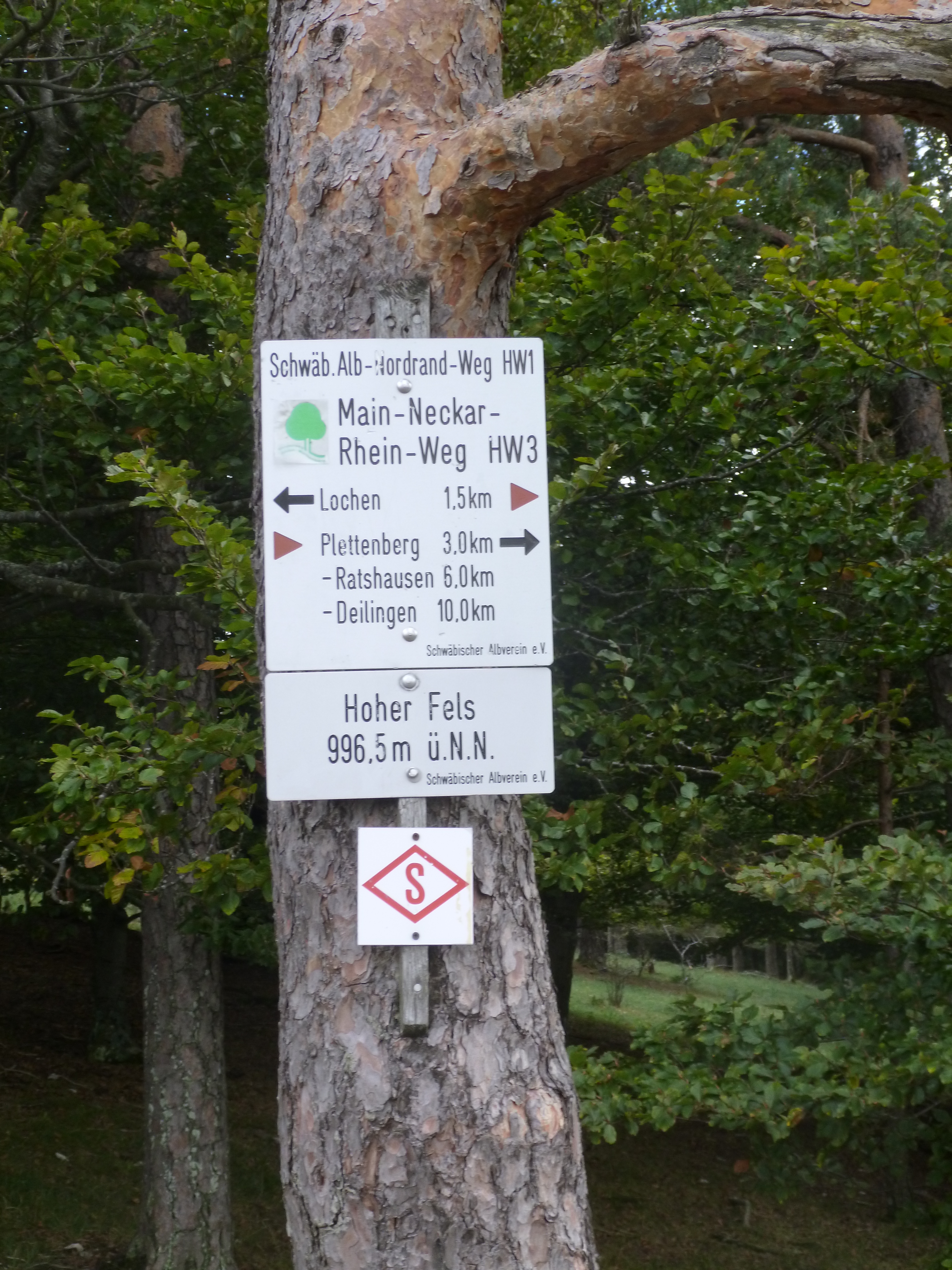 Hoher Fels beim Lochen